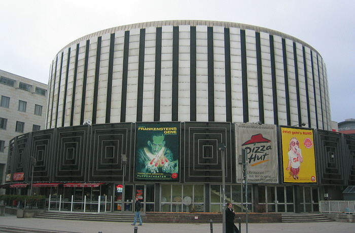 Dresden, Germany: Rundkino (cinema)